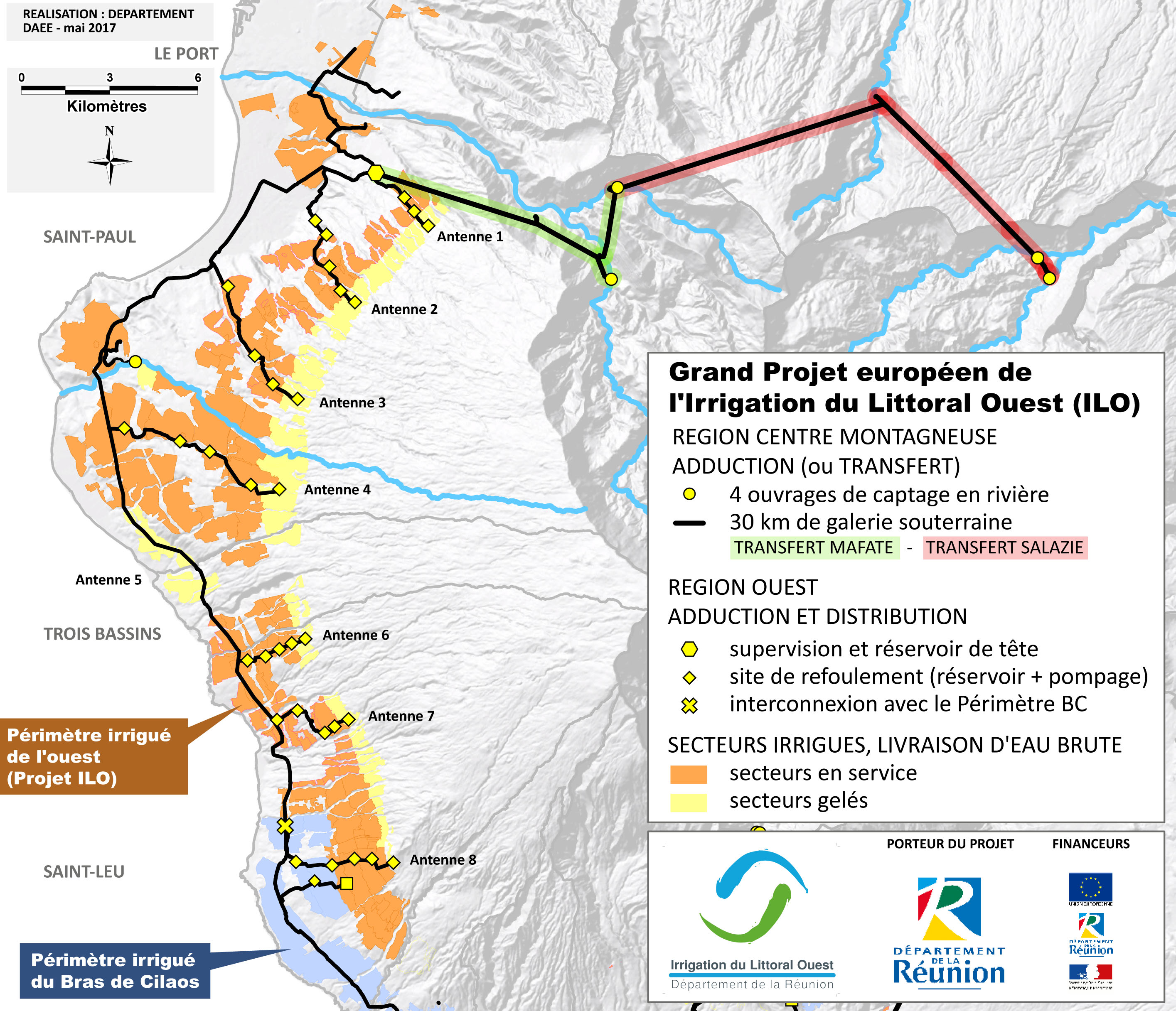 Carte schématique du périmètre hydro-agricole de l'ouest (île de La Réunion) qui est l'infrastructure résultant du Grand Projet de Travaux européen de l'Irrigation du Littoral Ouest (Projet ILO).